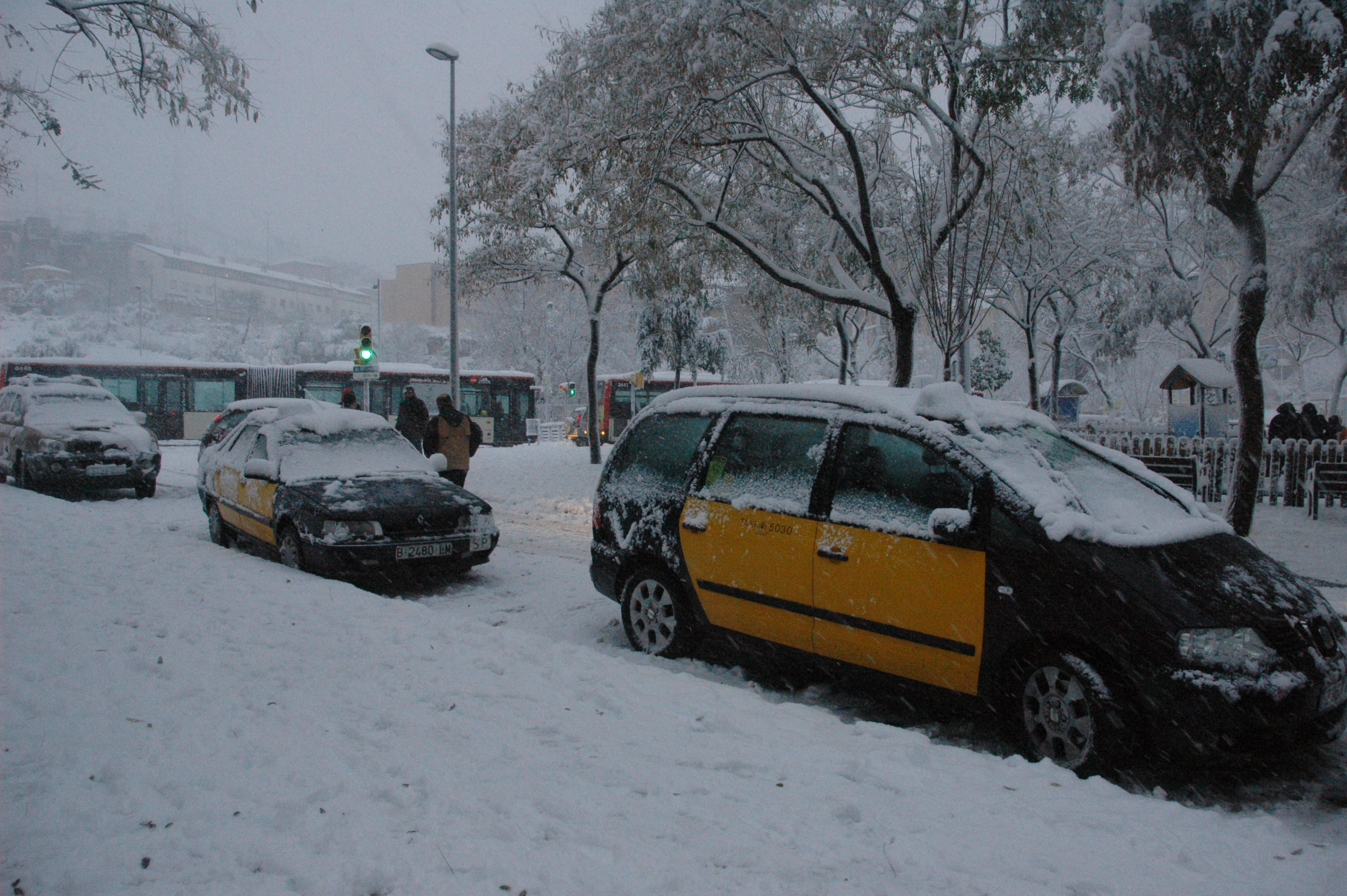 nevada març 2010